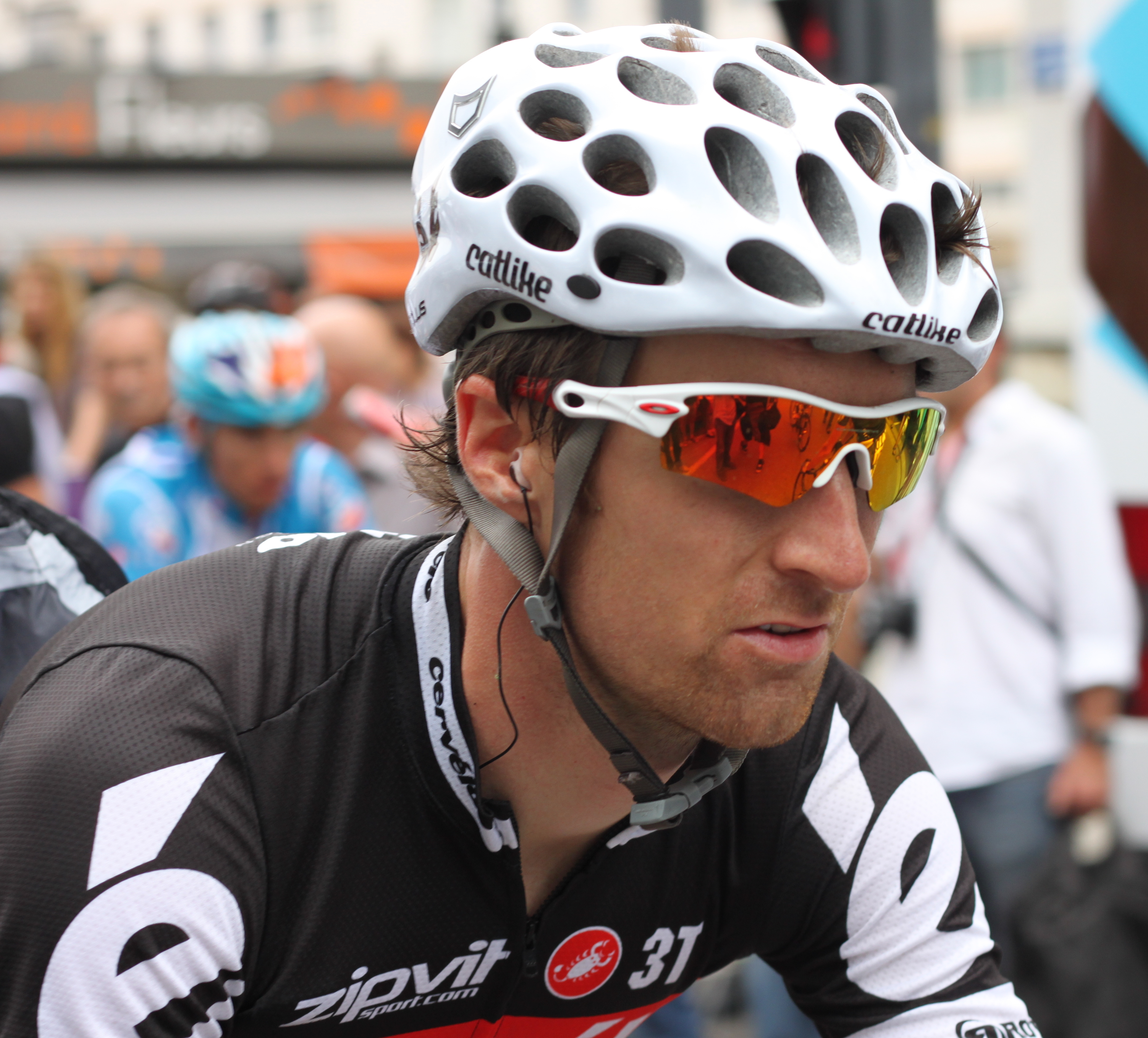 Daniel Lloyd à son arrivée à Grenoble après la 5e étape du Critérium du Dauphiné 2010